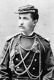 Oscar Fitzalan Long